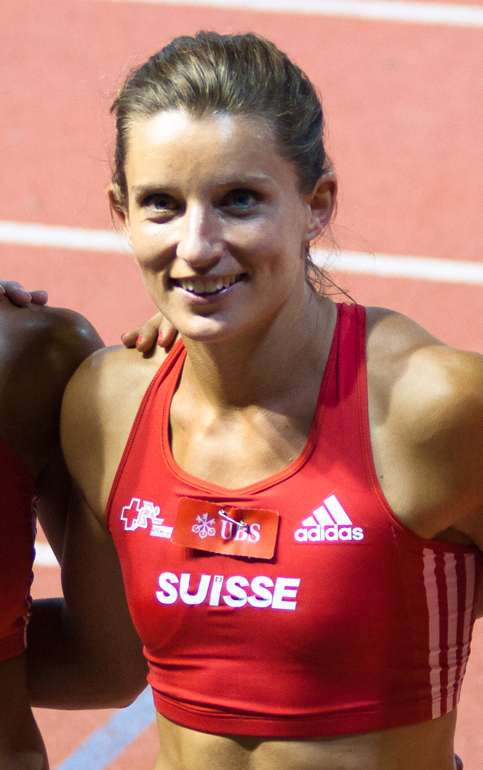 Athletissima 2012 - relais 4x100m F Suisse (Léa Sprunger, Mujinga Kambundji, Ellen Sprunger et Michelle Cueni)